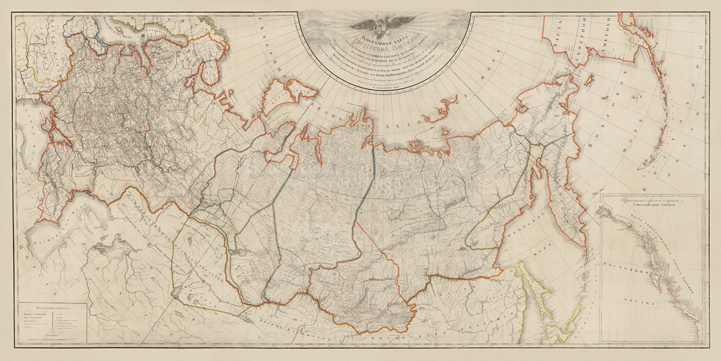 Карта издана и гравирована Г. Савинковым в 1822 году